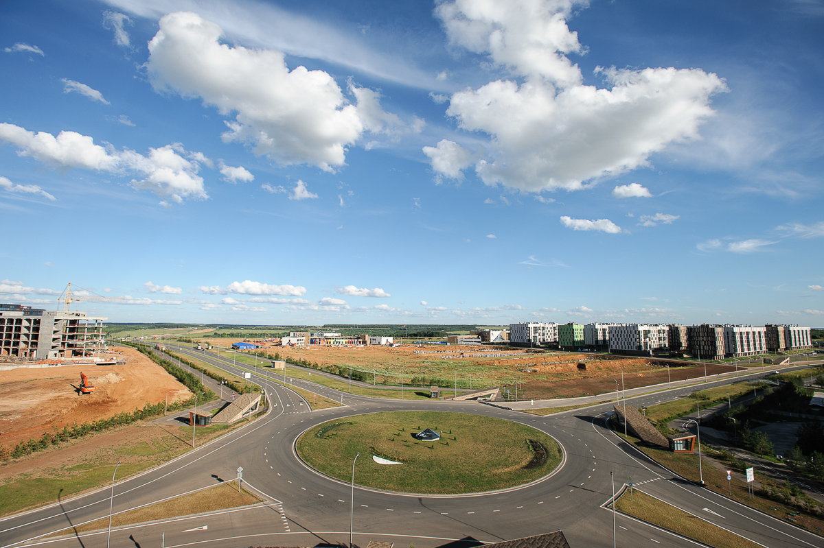 Вид на жилые дома в Иннополисе